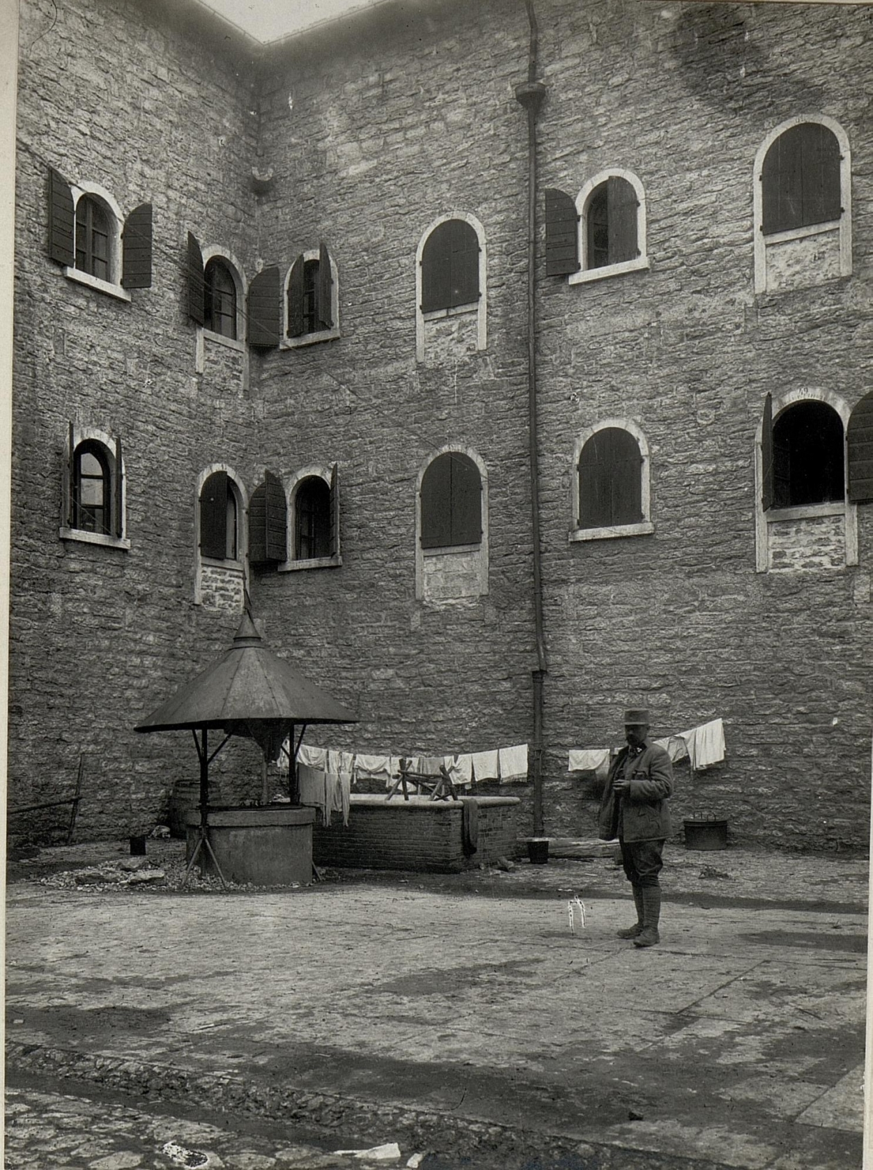 Hof der Kaserne Interotto. Aufgenommen am 5. Juni 1916.